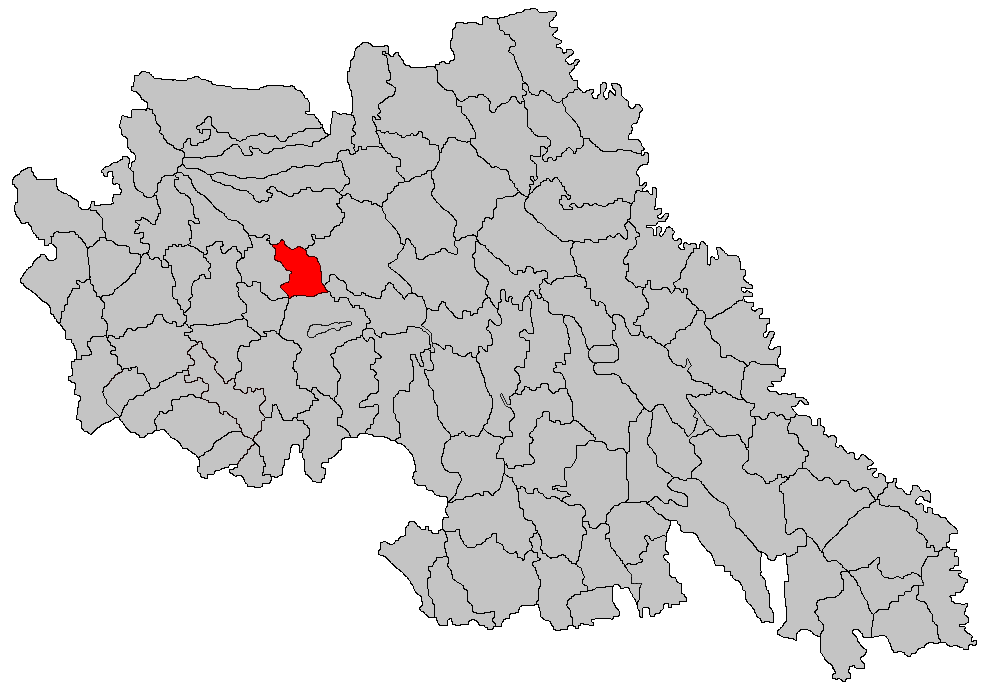 Categorie:Hărţi ale judeţului Iaşi